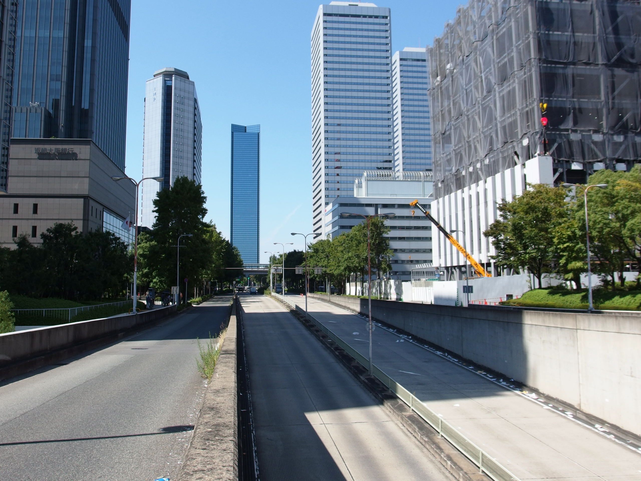 城見通, 大阪府大阪市